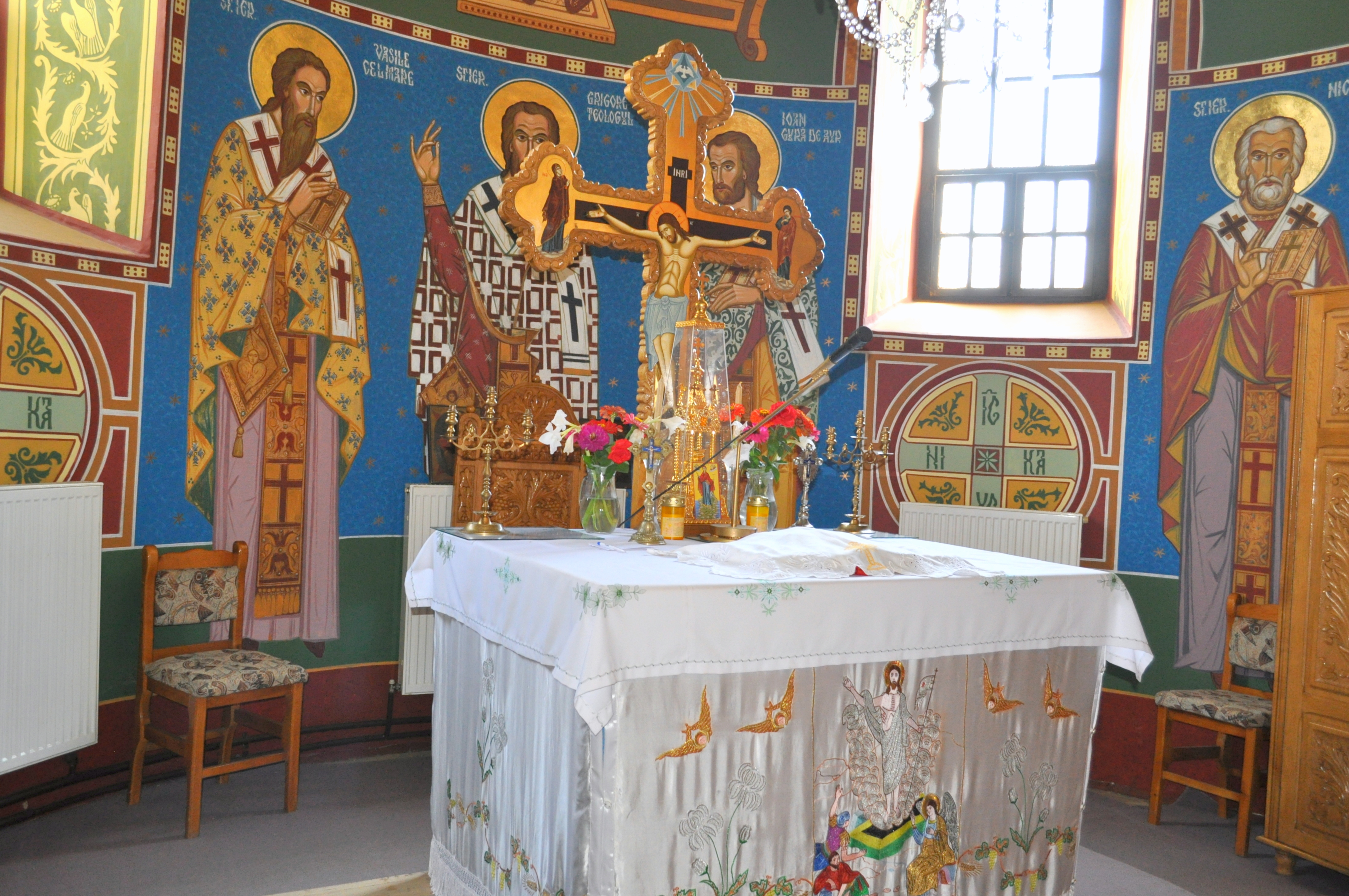 Biserica ortodoxă „Sf. Arhangheli Mihail și Gavriil”, sat Feldru; comuna Feldru